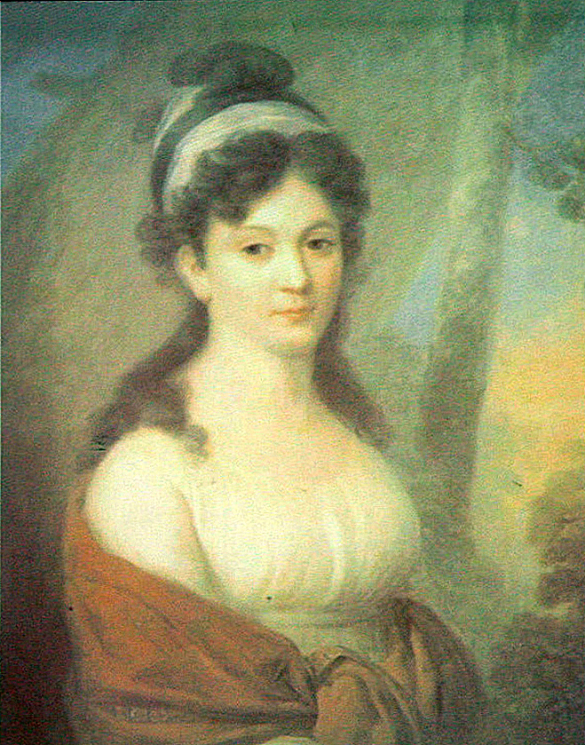 Портрет Екатерины Львовны Тютчевой, матери поэта Ф. И. Тютчева. Холст, масло.